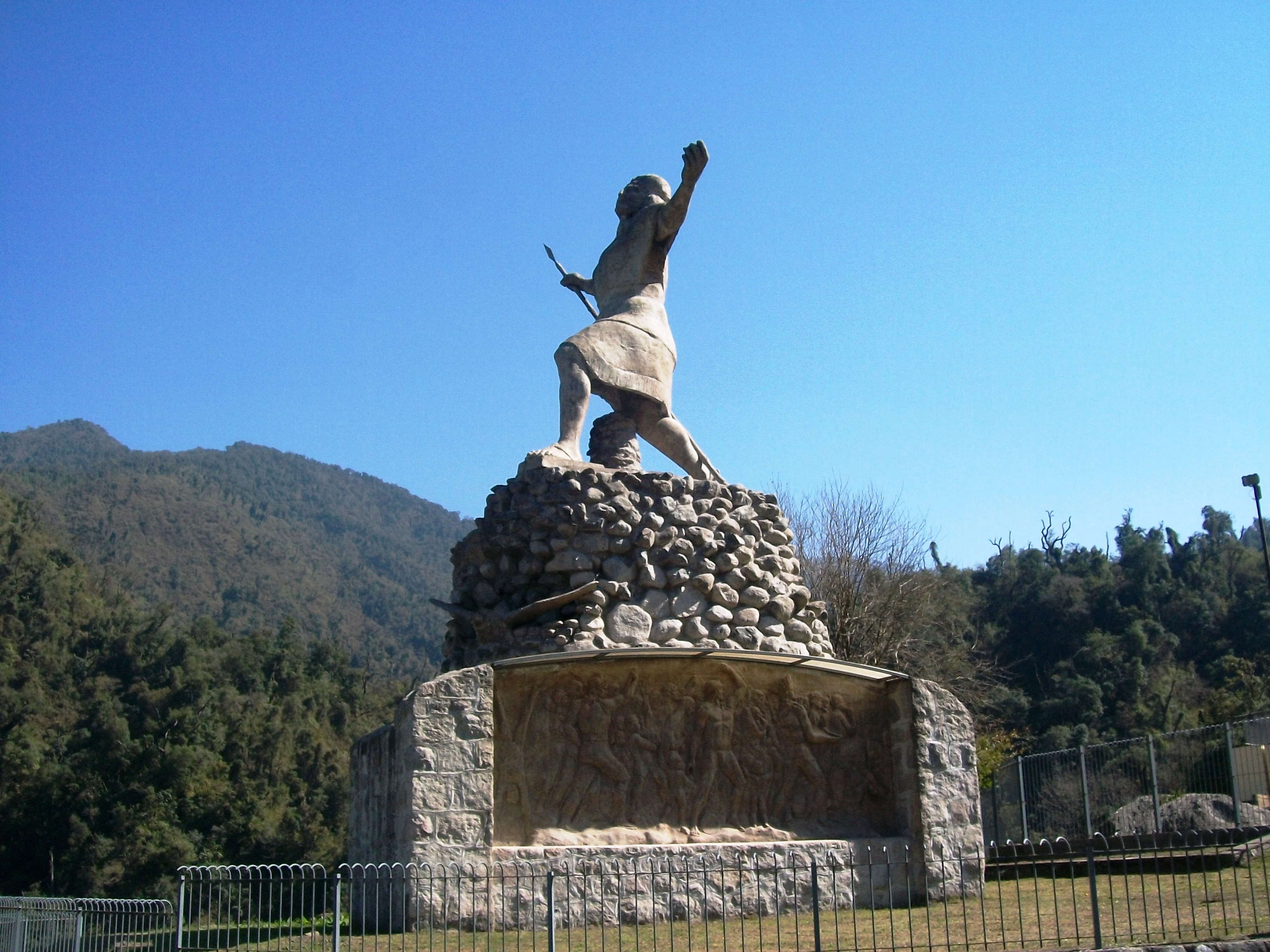 Monumento al Indígena del escultor Prat Gay, quebrada de los Sosa, Tucuman, Argentina.